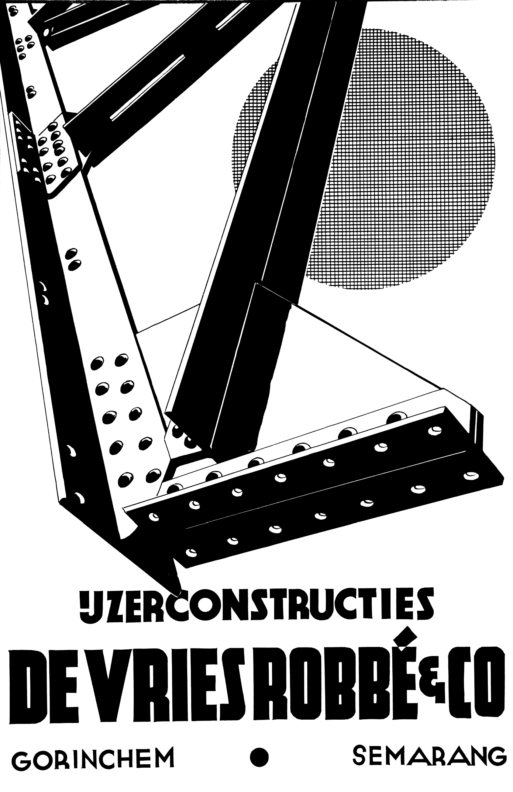 Affiche van het bedrijf De Vries Robbé 1933